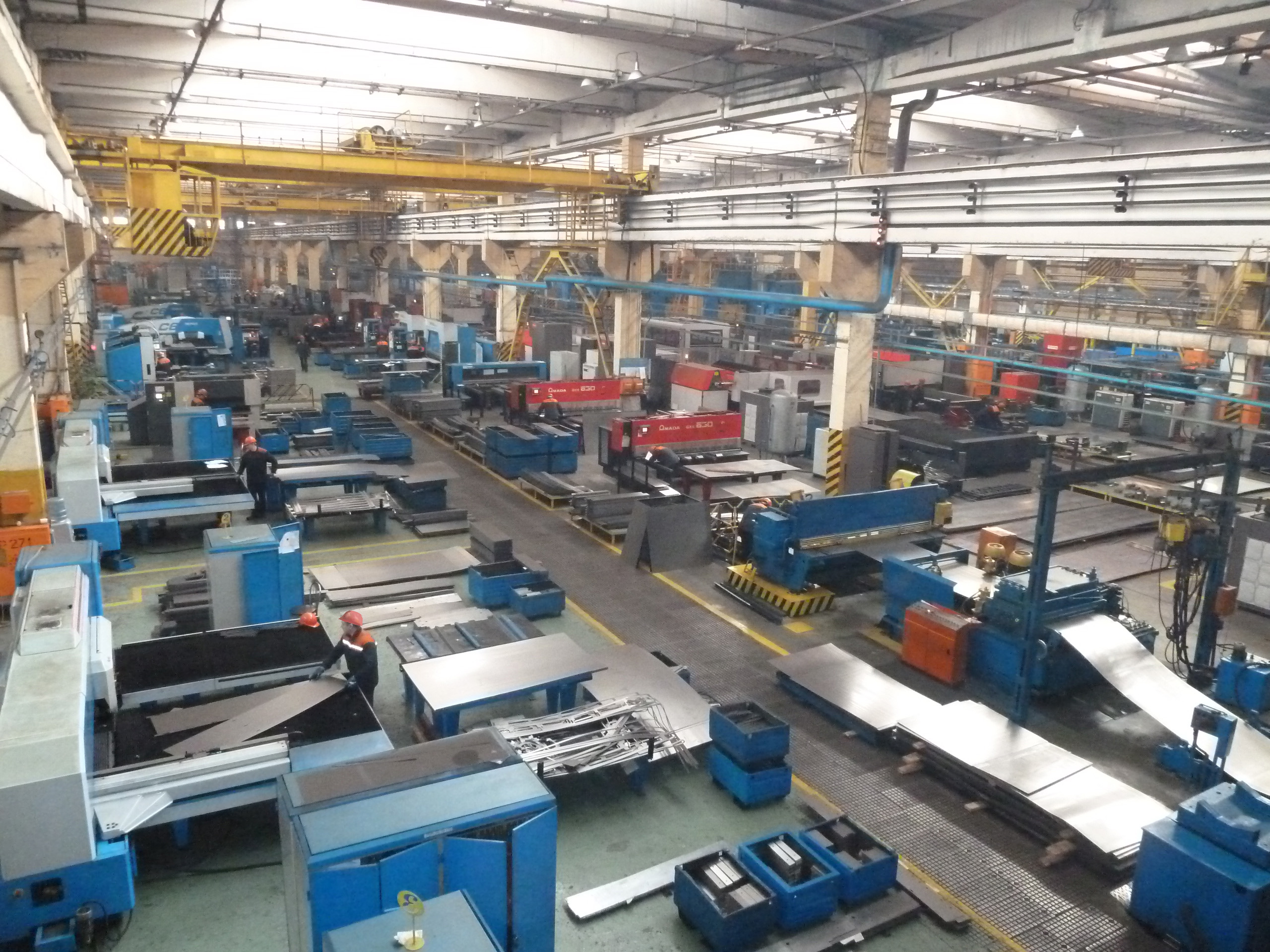 Цех металлоконструкций ОАО "Могилевлифтмаш" Цэх металаканструкцый ААТ "Магілёўліфтмаш"